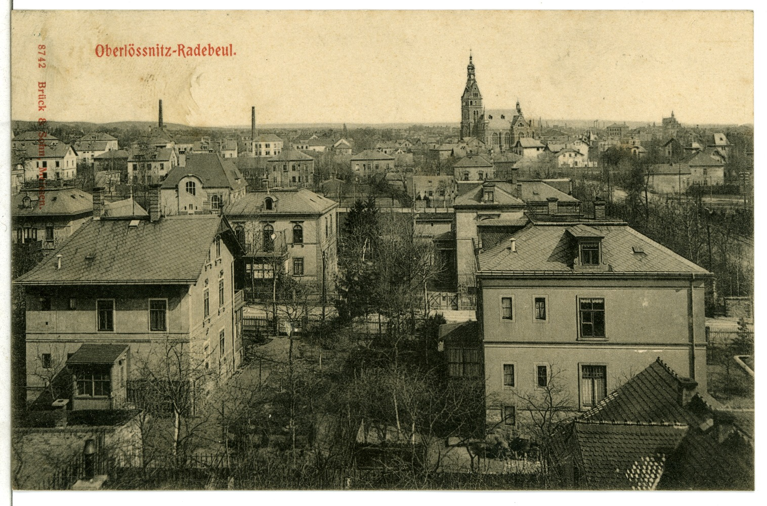 Radebeul; Blick auf die Oberlößnitz This postcard is from publisher Brück & Sohn in Meißen ( postcard has a unique number 08742 and is available in a higher resolution at the publisher. This images was uploaded in a cooperation project between Wikipedians and the publisher.